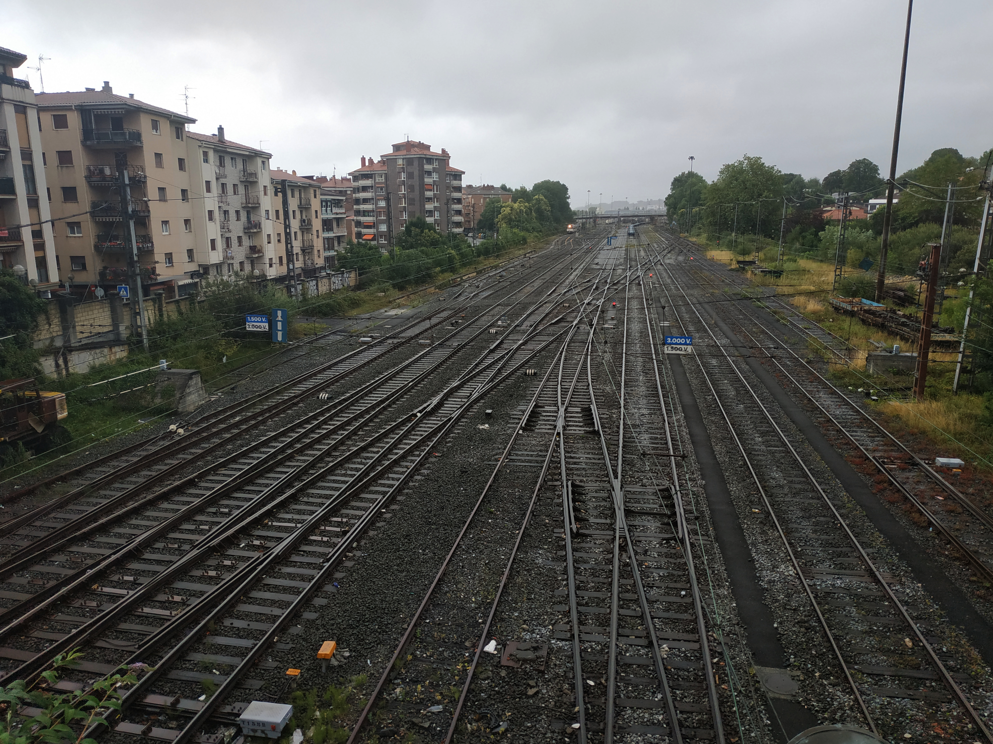 Changement de tension entre les voies françaises et les voies espagnoles à Irun.